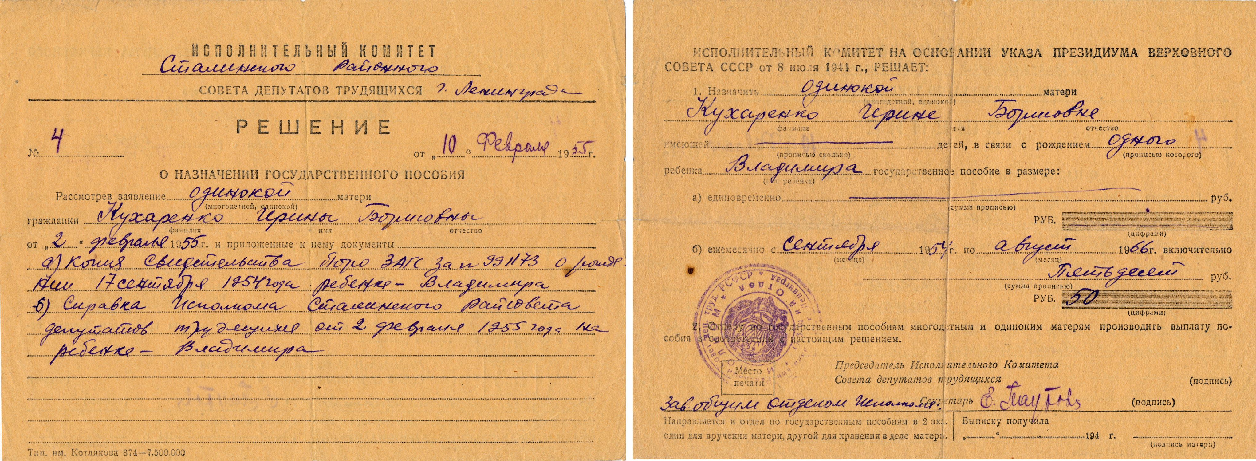 Решение о назначении государственного пособия одинокой матери, 1955 год.